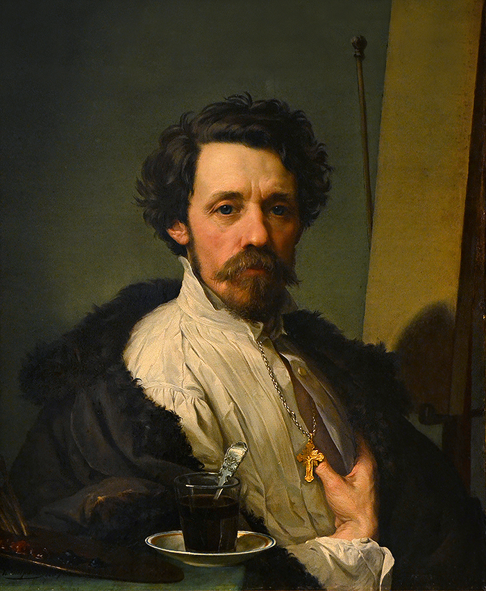 П. Тюрин. Автопортрет. 1857